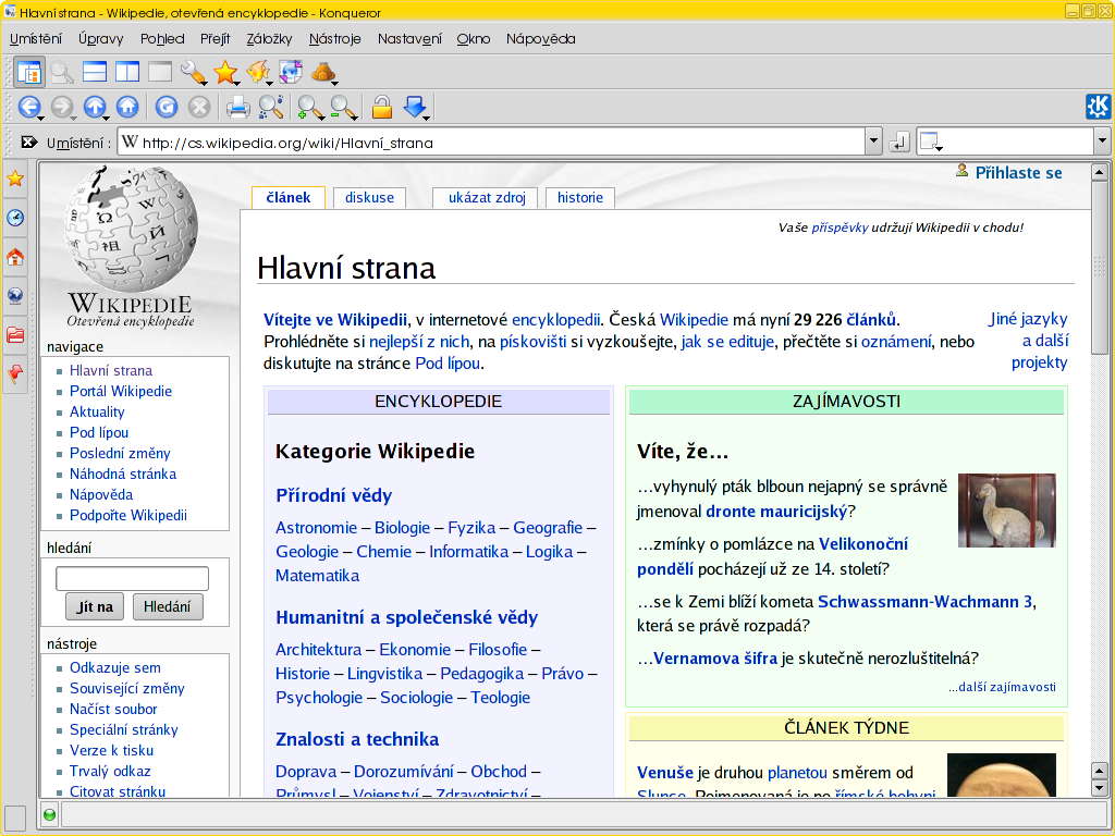 Konqueror při prohlížení webu.